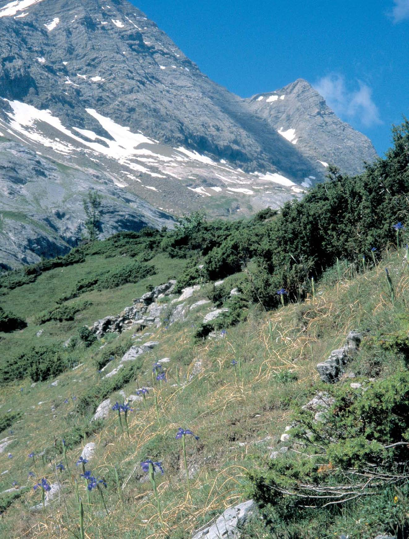 Groupe d'Iris latifolia à Gavarnie, lors d'un voyage botanique